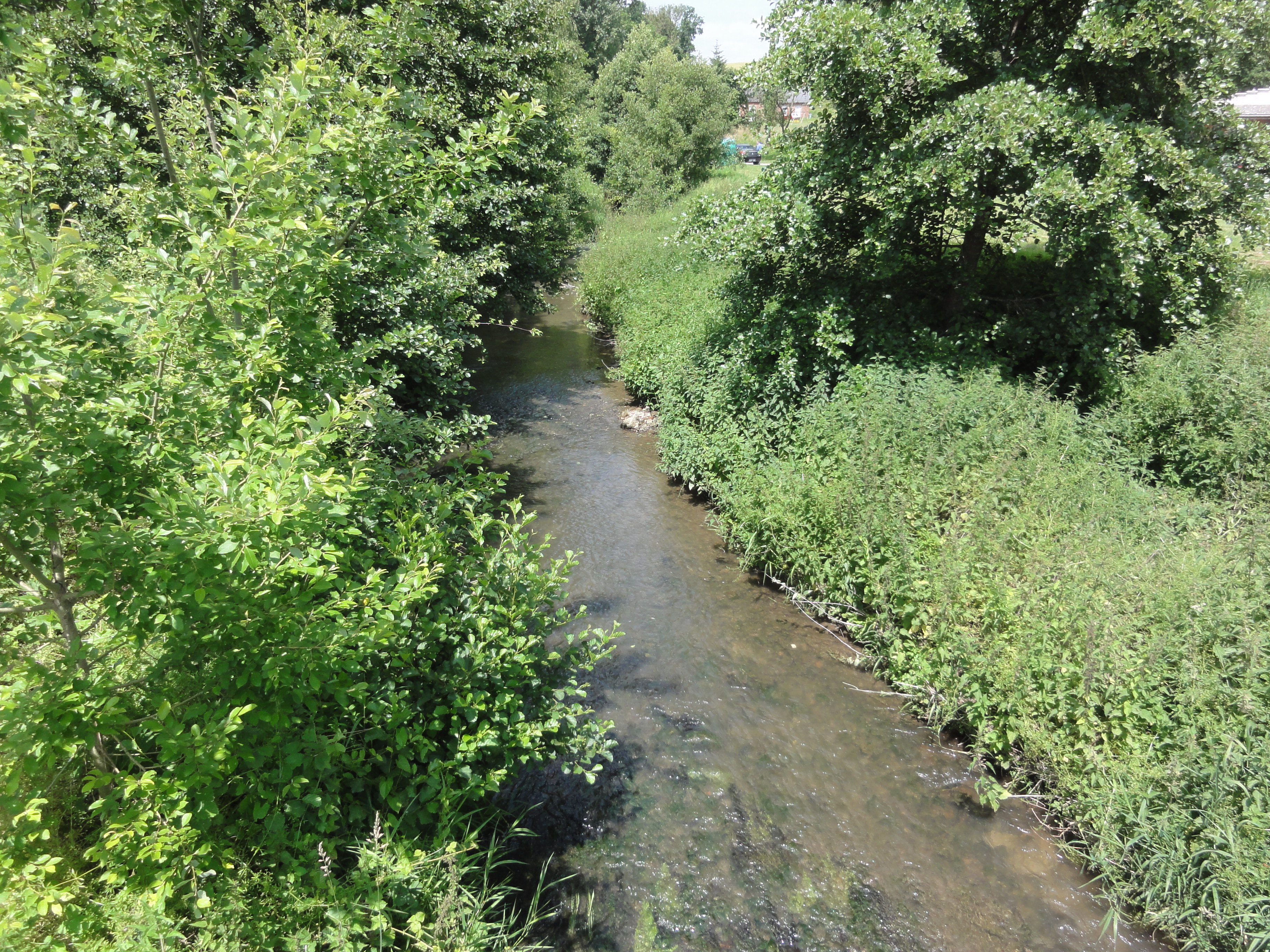 Iron (Aisne) Iron (rivière)